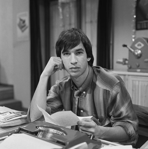 Pim Vosmaer in De grote klok